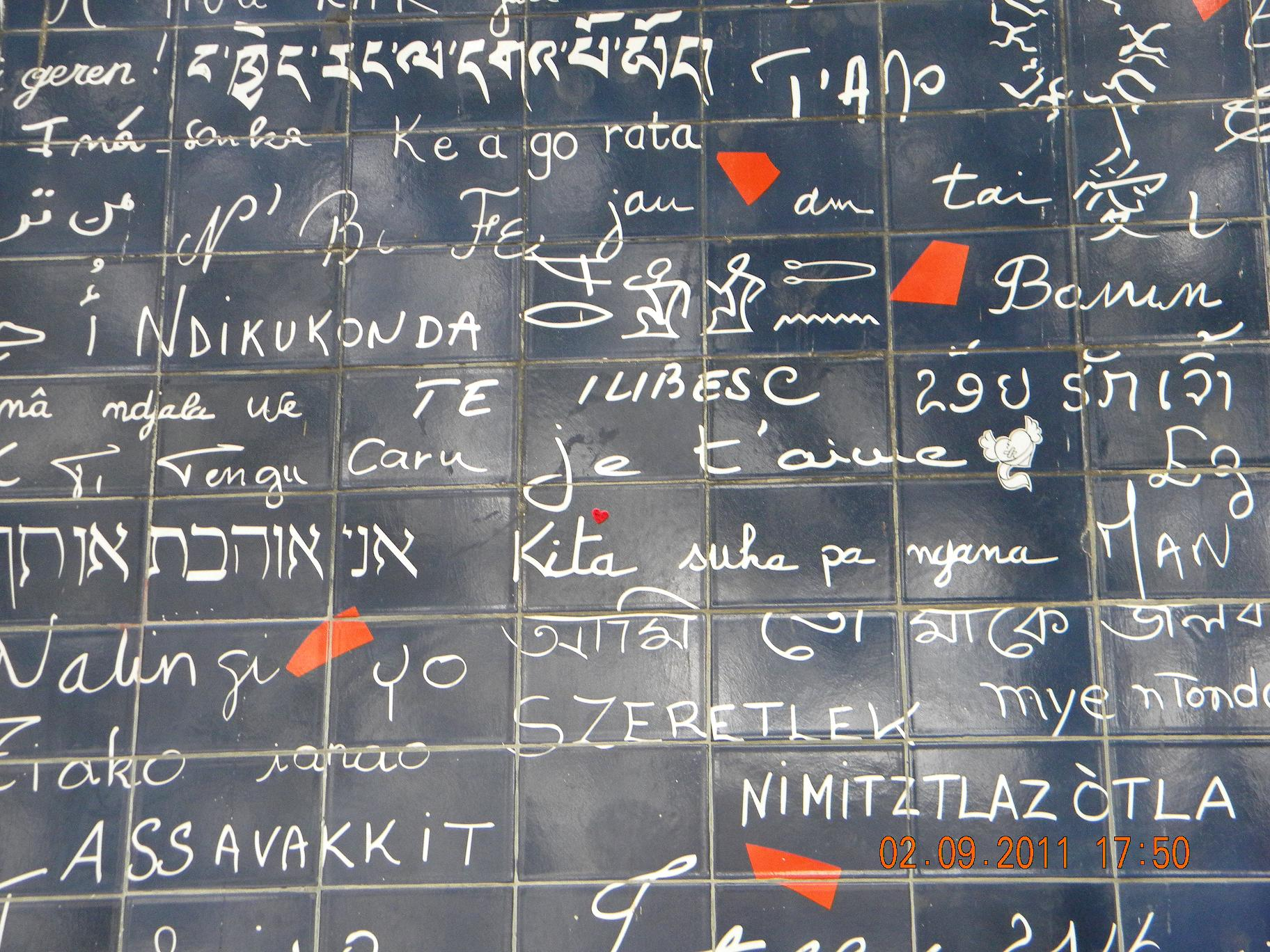 Paris, France. Piata Jehan-Rictus. Peretele cu declaratia de dragoste "Je t'aime" in 311 limbi. Printre ele si "Te iubesc" in limba romana.(Detaliu) This photo has been taken in the country: France